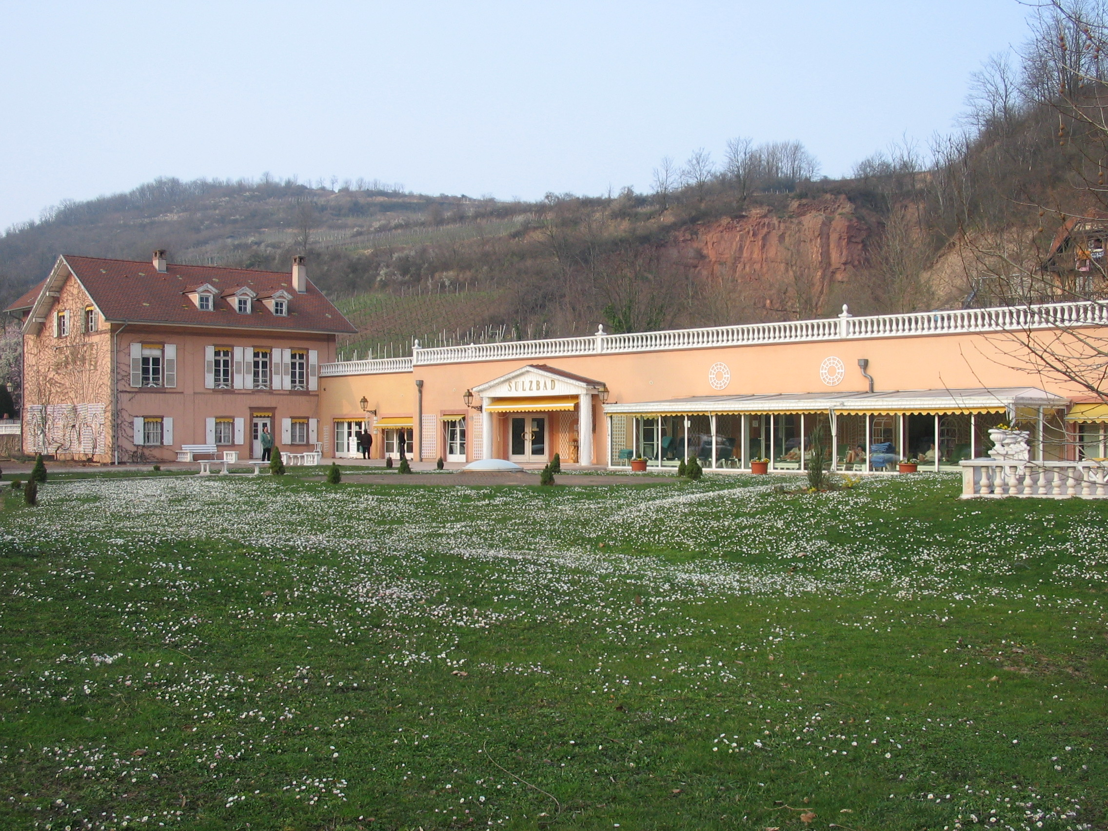 les Bains de Soultz Sulzbad établissement thermal de remise en forme à l'entrée de Wolxheim, dans le Bas-Rhin